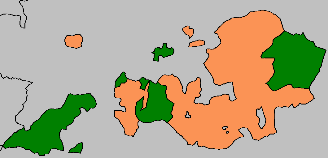 Anhalt-Dessau-Köthen (oranje) en Anhalt-Bernburg (groen)